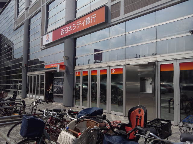 西日本シティ銀行田島支店 （福岡市中央区・イオンスタイル笹丘併設）